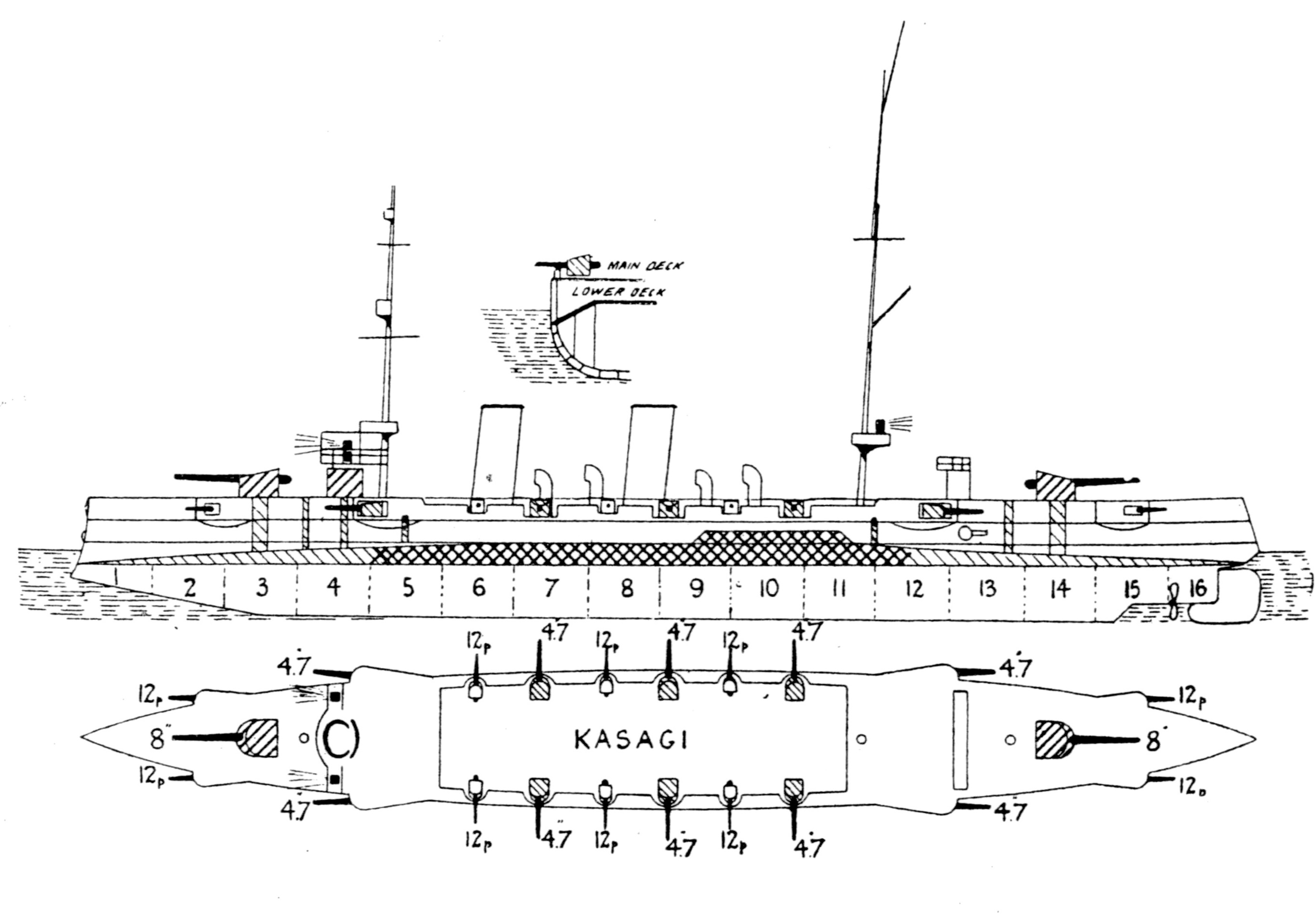 装甲巡洋艦「笠置」